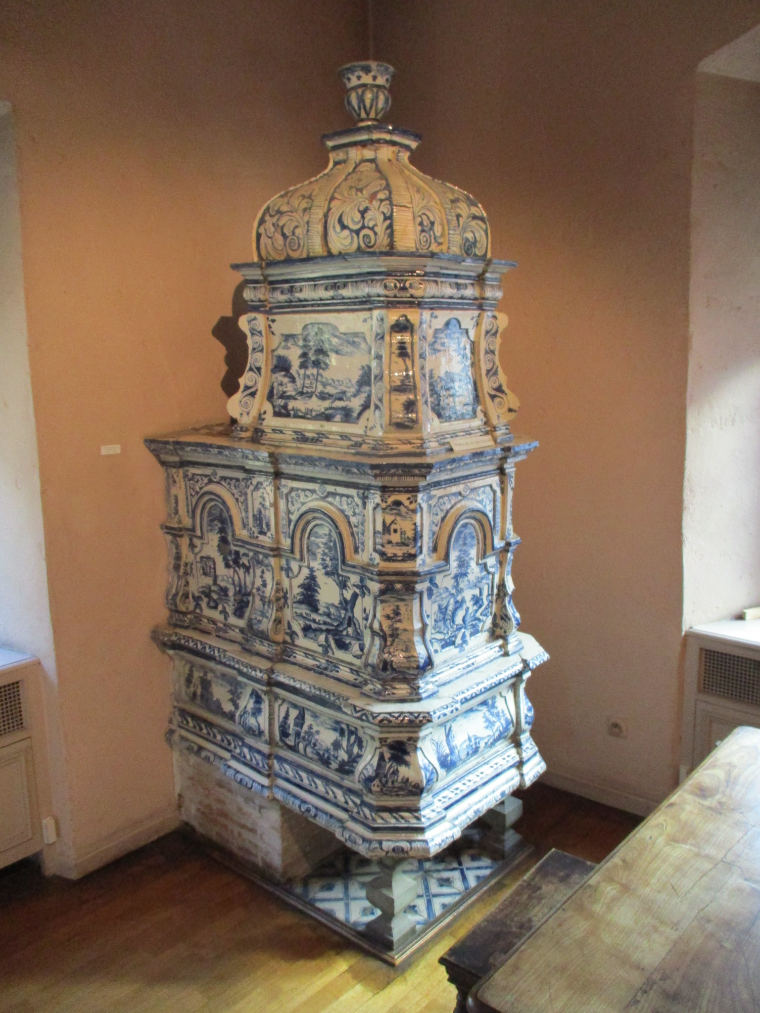 Kachelofe du Musée historique de Mulhouse